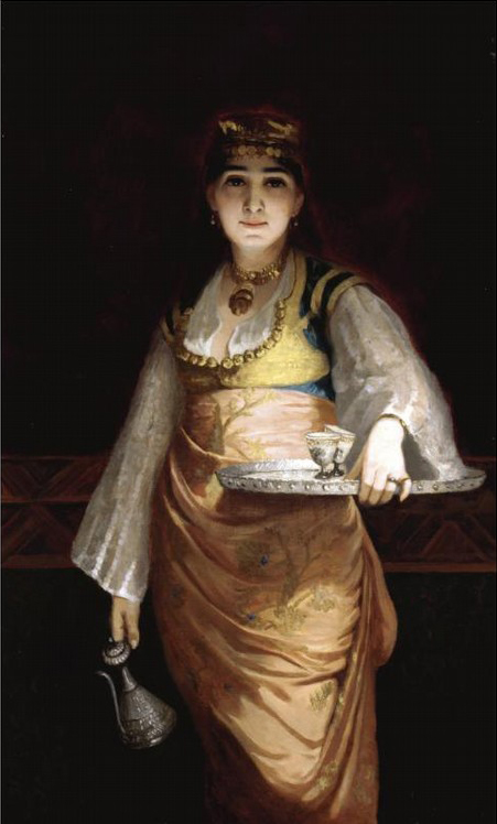 Odalisque